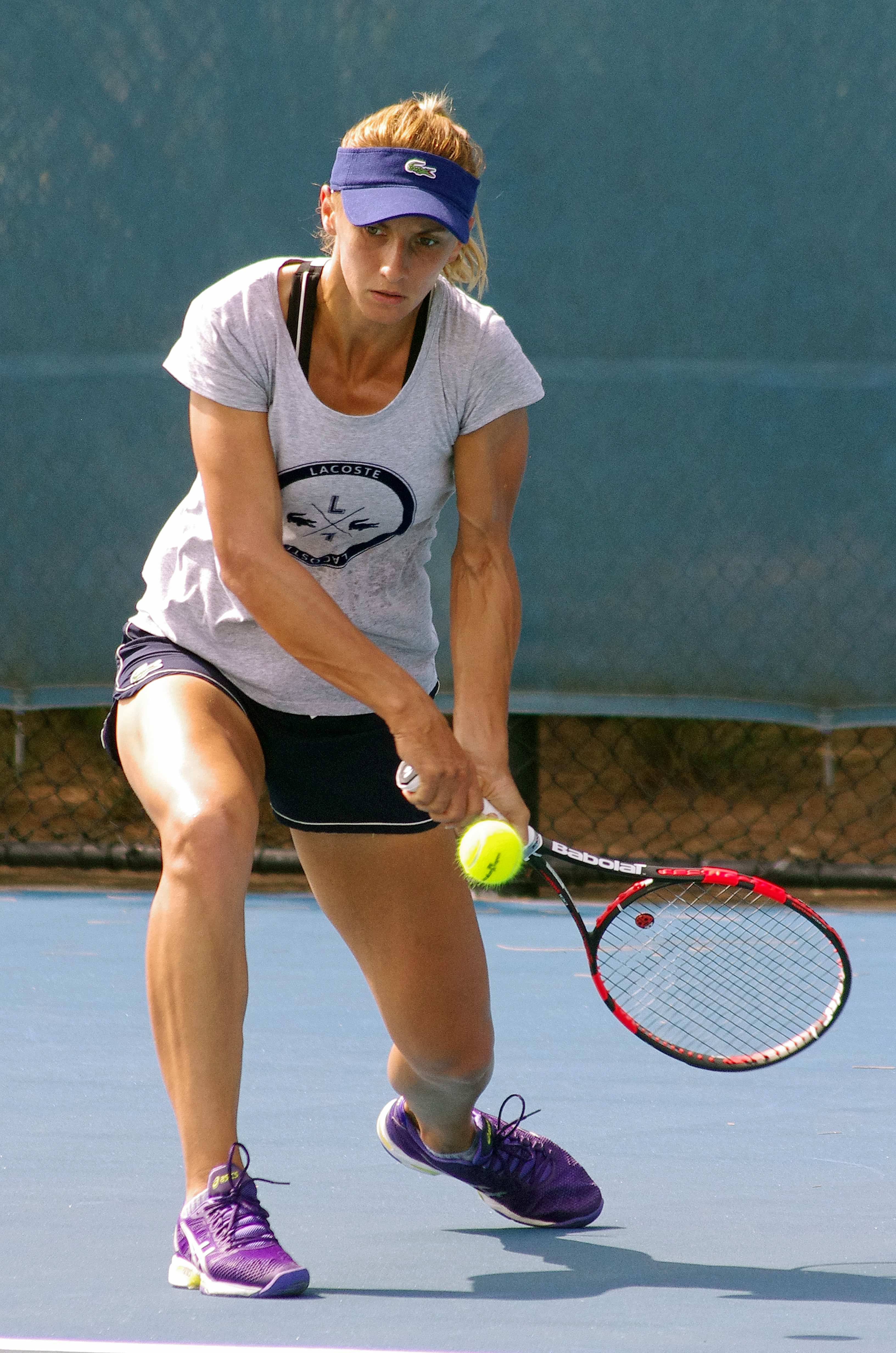 Lesia Tsurenko